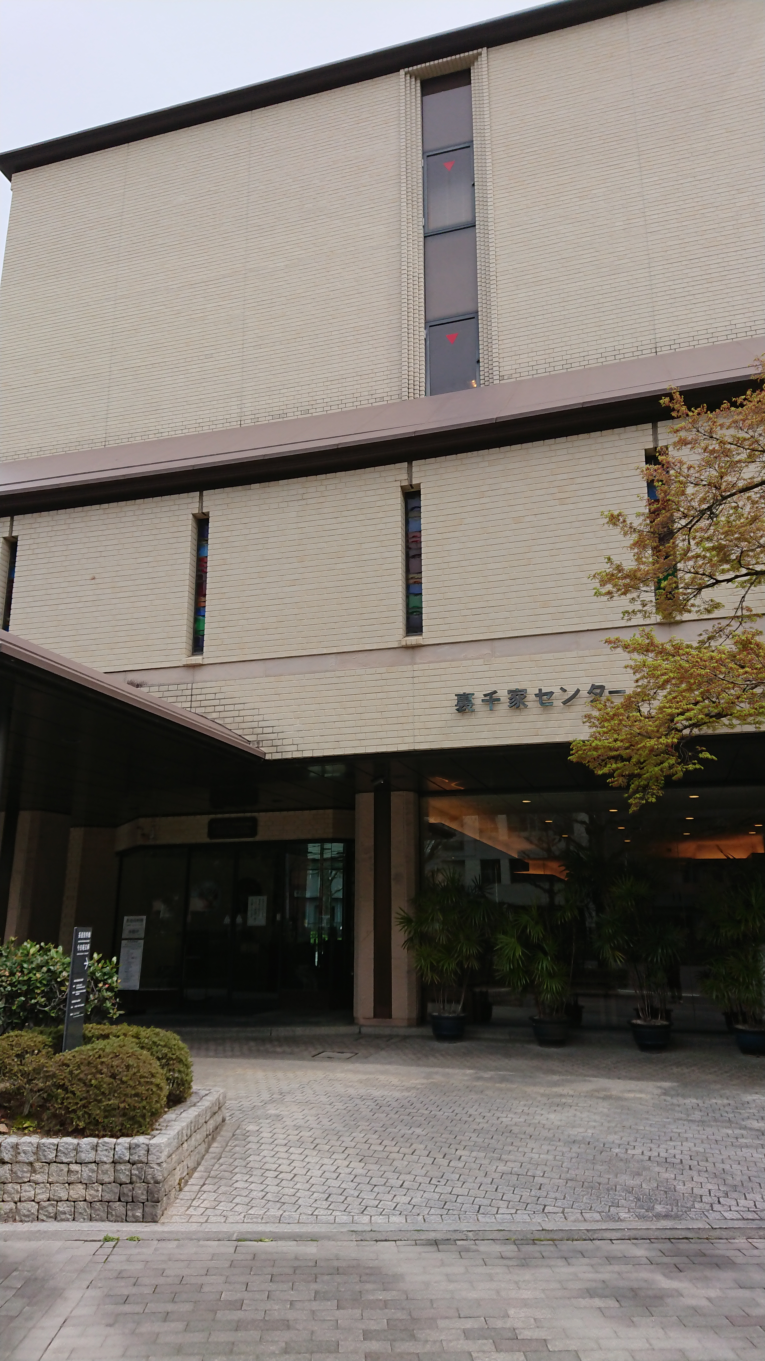 裏千家センター, 京都